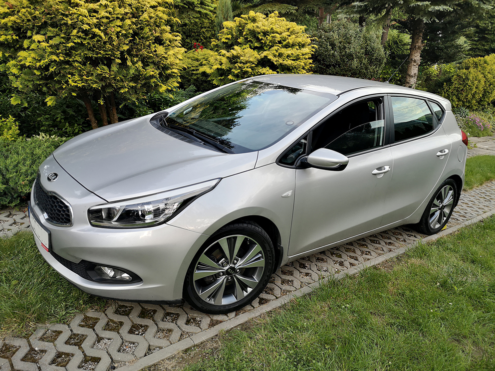 Kia cee'd II hatchback